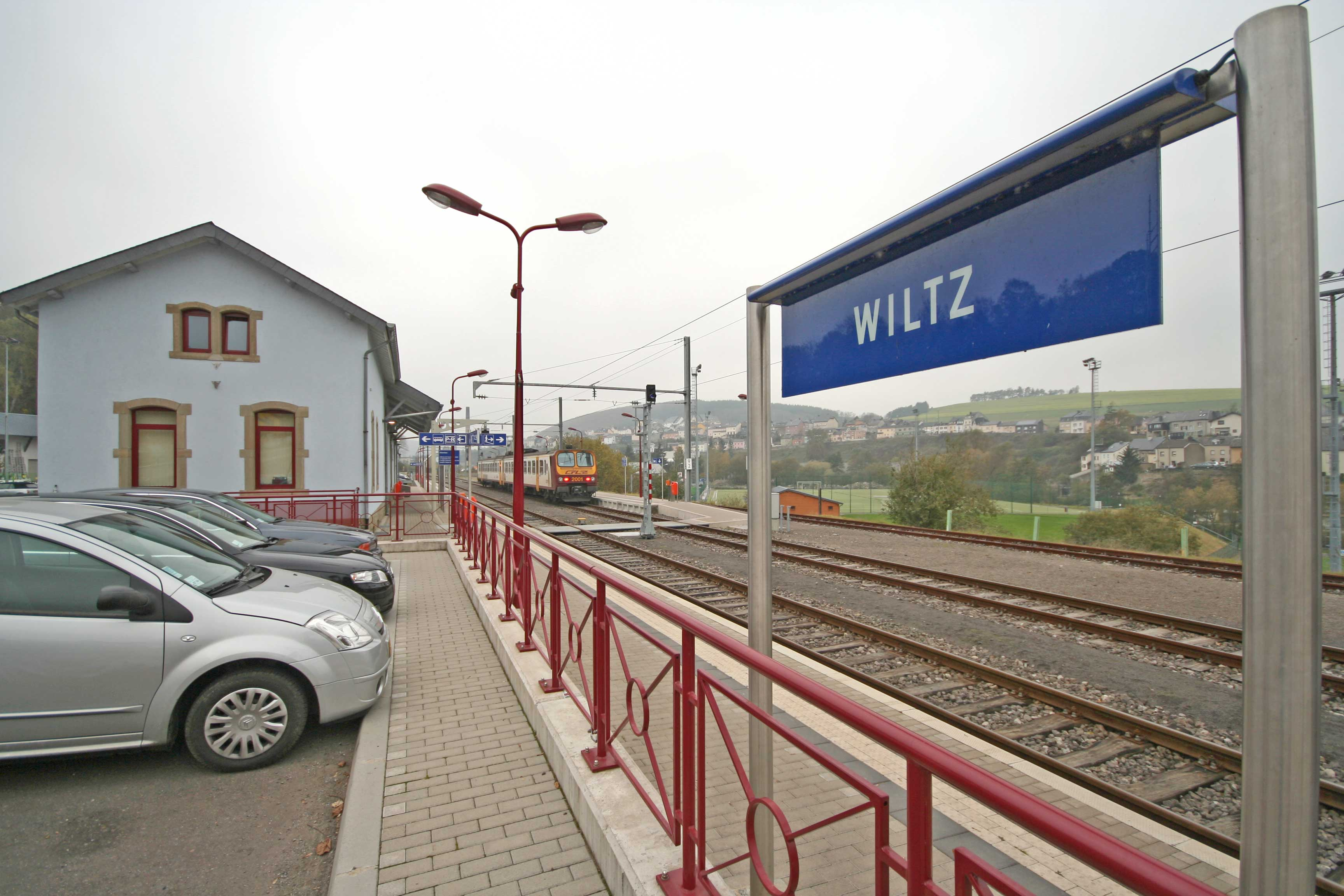 Sujet:Gare Wolz Source:Eege Foto vum lb::lb:User:Cornischong Lizenz